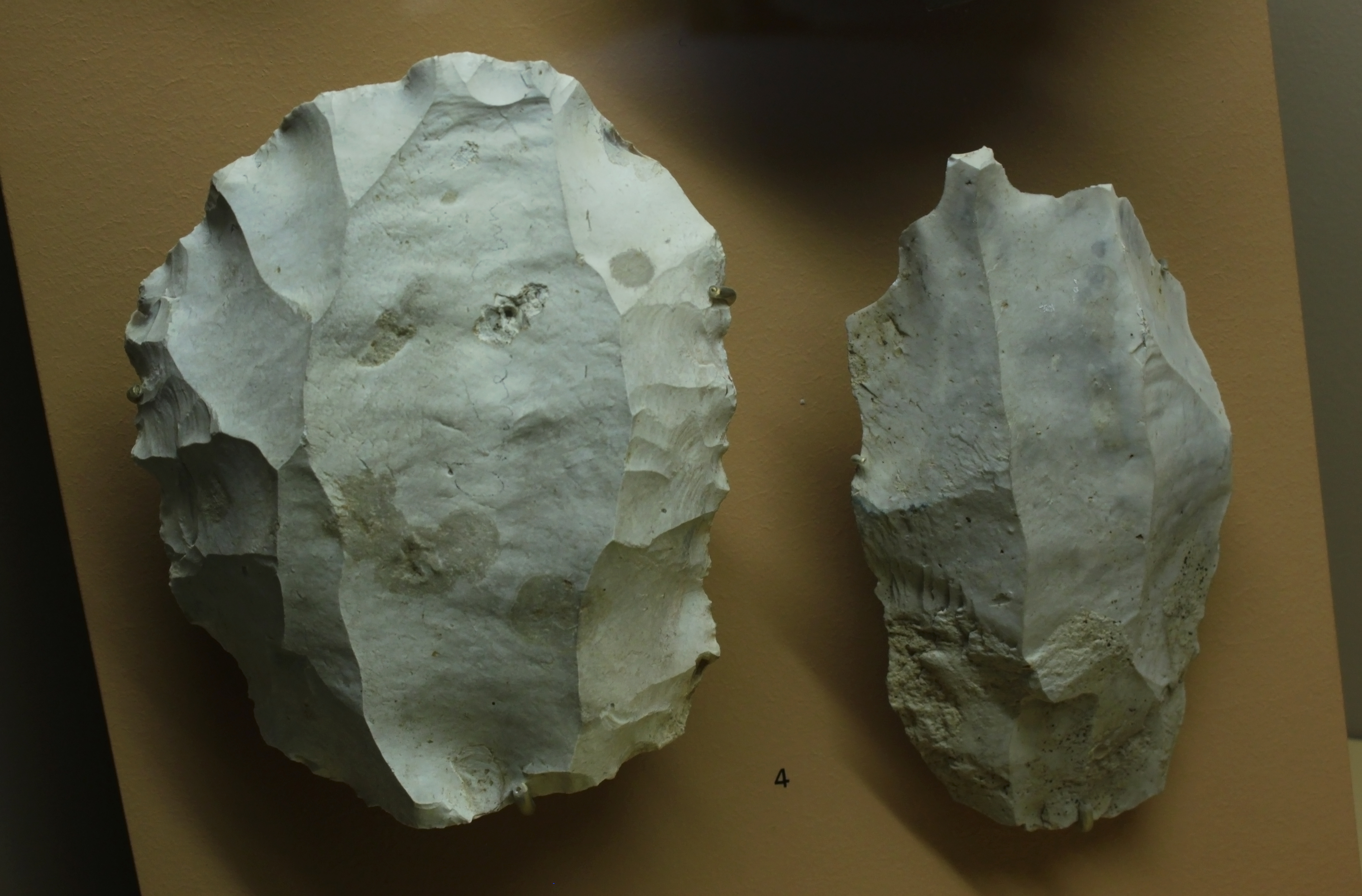 Nucleus Levallois à éclat préférentiel, Paléolithique Moyen. Provient de Saint-Aignan-sur-Ry ( Seine Maritime ). Musée d'archéologie nationale, à Saint-Germain-en-Laye.